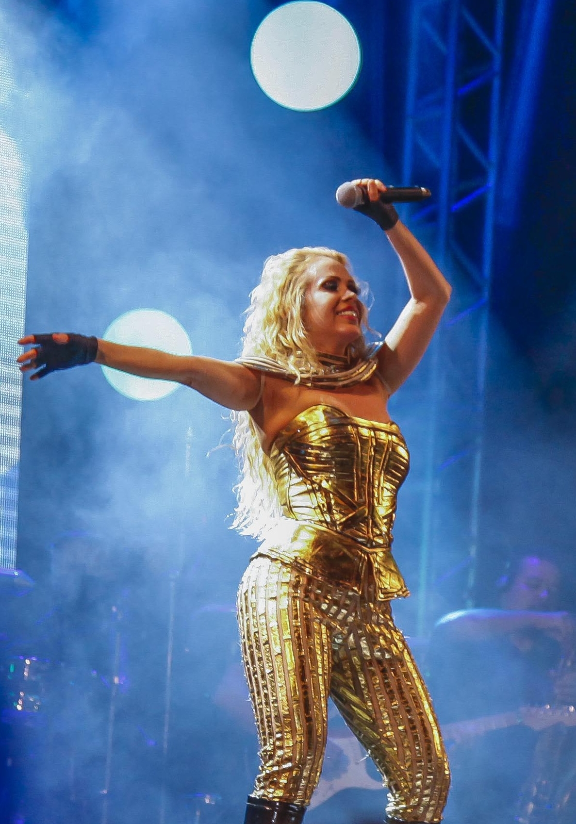 Joelma no Mossoró Cidade Junina, em 2016.